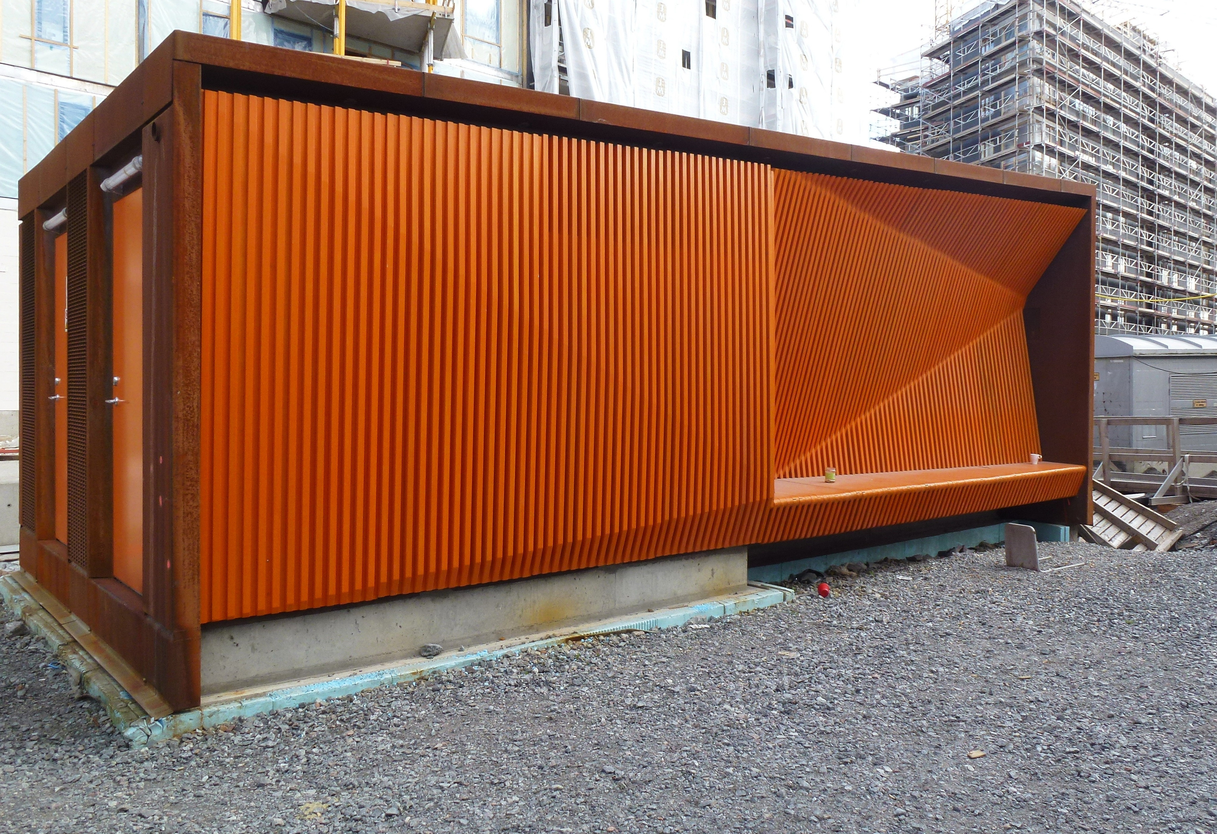 Ellevios teknikhus, Storängstorget, nominerades till "Årets Stockholmsbyggnad 2015"